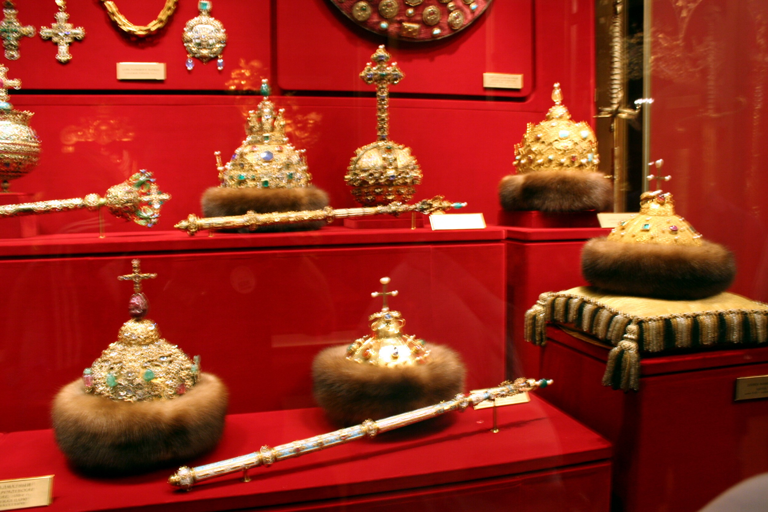 Museo de la Armería estatal, Oruzbeynaya palata, en el Kremlin. Coronas reales